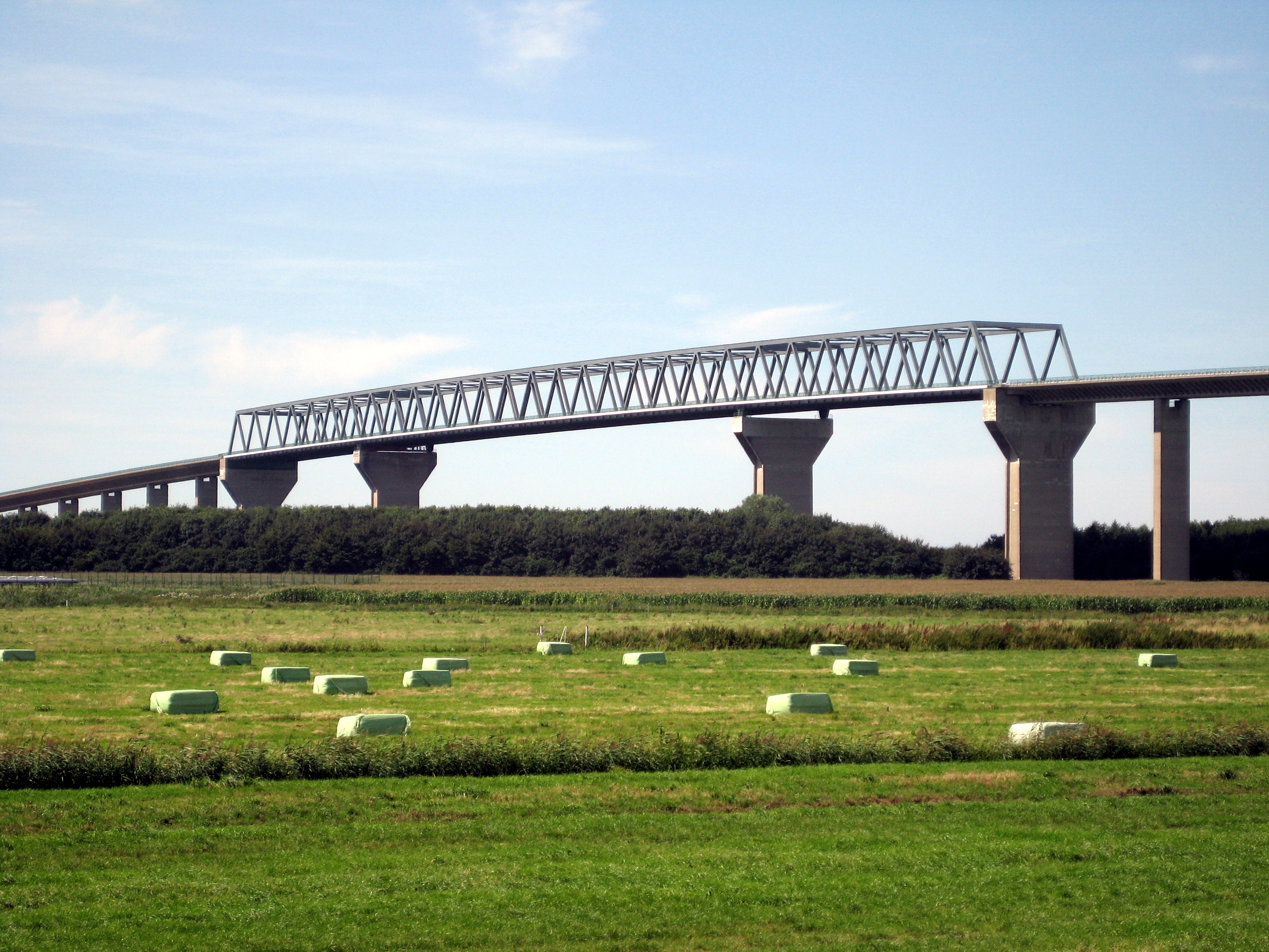 Hochbrücke Brunsbüttel, Germany, Nord-Ostsee-Kanal